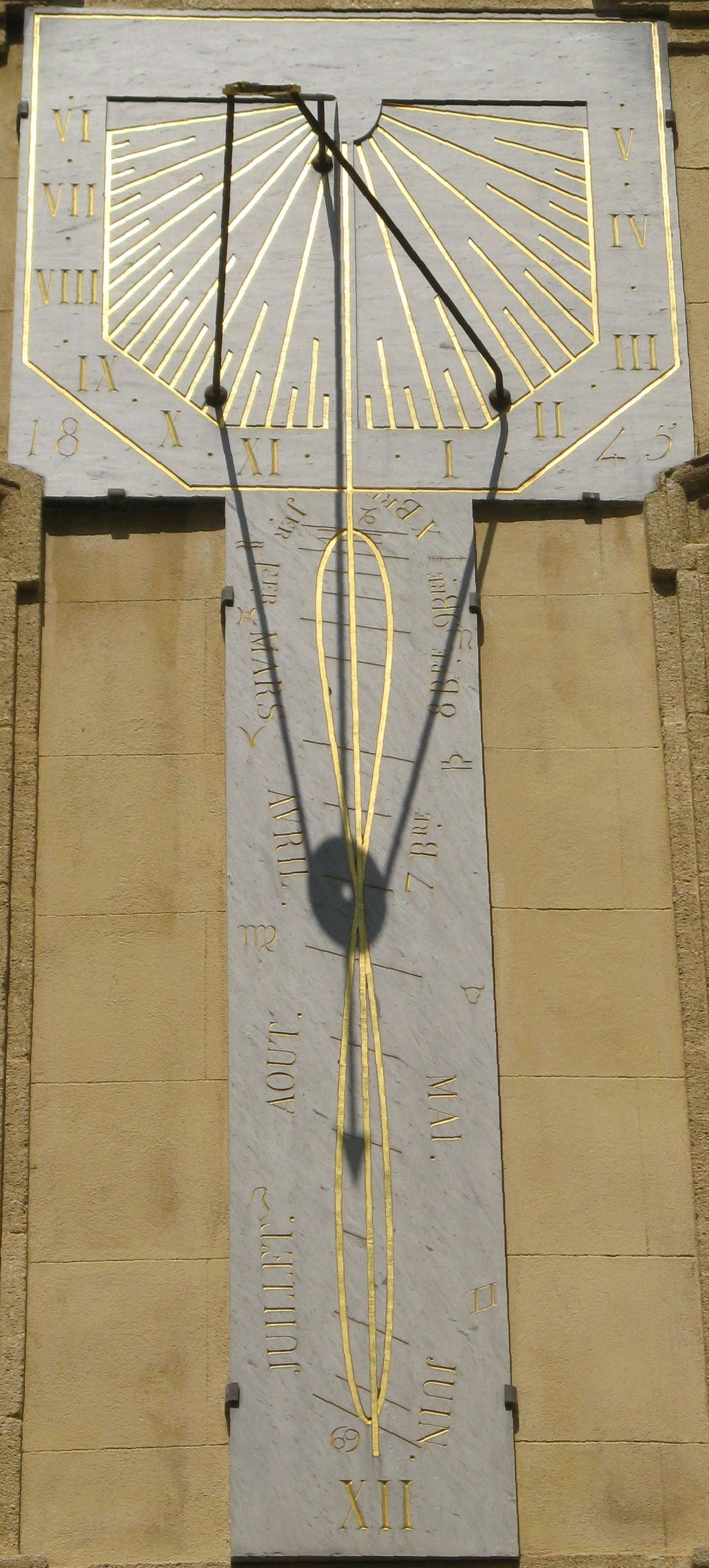 Mittagsweiser: Sonnenuhr mit zusätzlichem Mittagsweiser für Mittleren Mittag in Aix-en-Provence (Place Richelme)